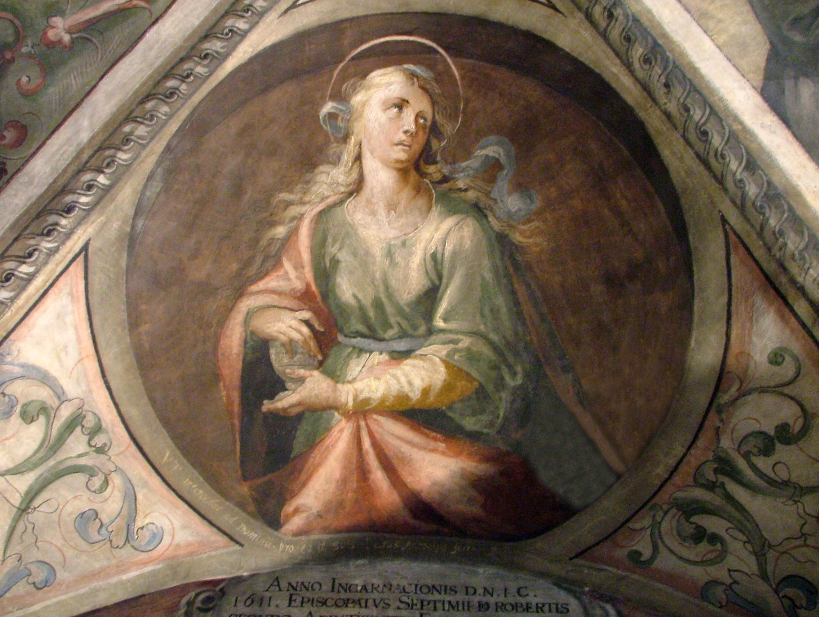 Chiesa di S. Chiara, cappella del Crocifisso, affrescata dal Ferro nel 1611. Tondo raffigurante la Maddalena, figura cui l'artista era particolarmente legato.